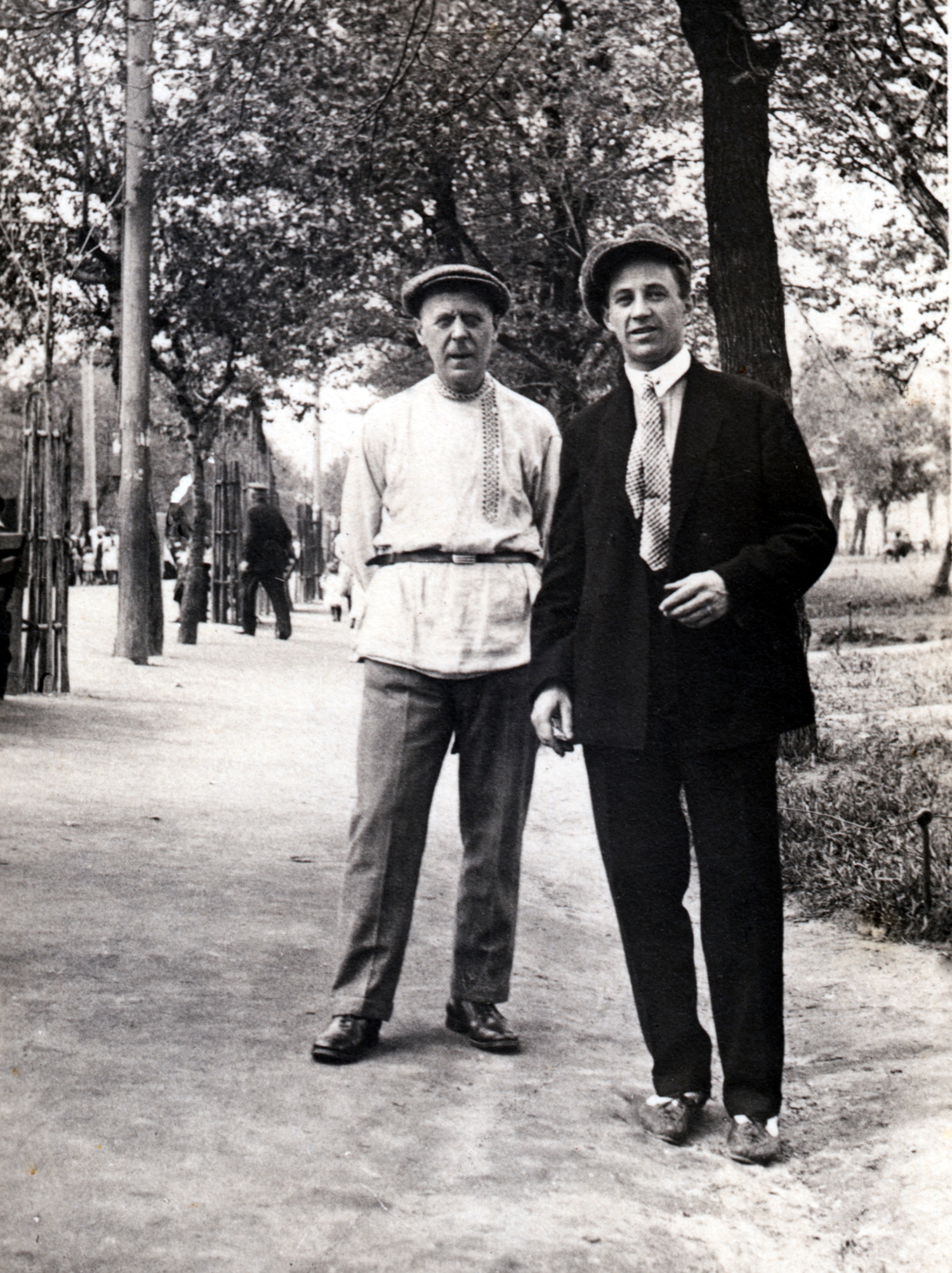 Семён Савельевич Ильин и Сергей Иванович Маркин в парке на Чистых прудах